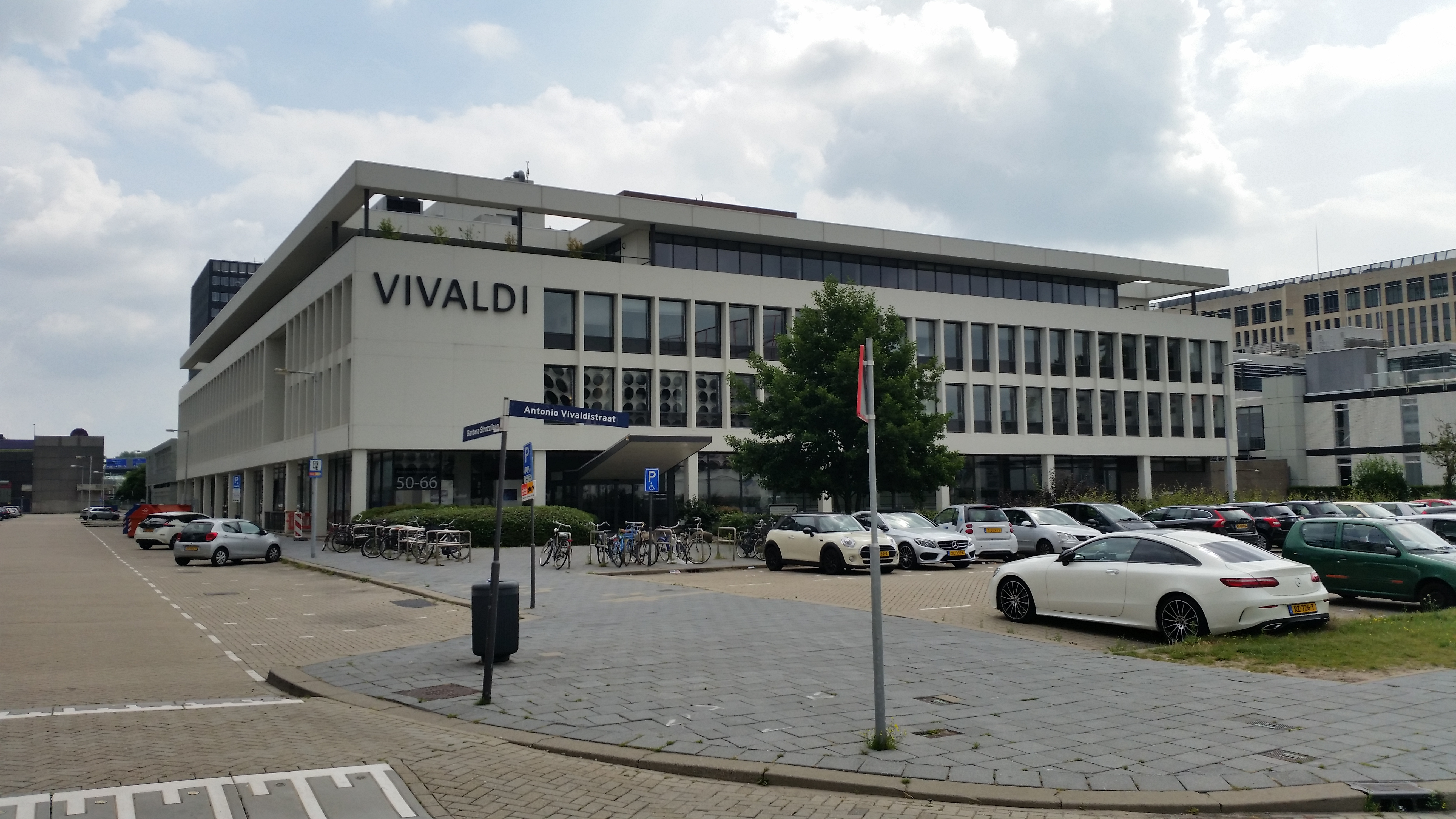 Gebouw Vivaldi